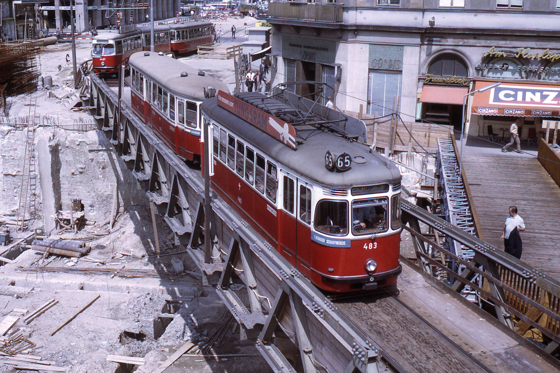 L3 483 auf Linie 65 passiert am Karlsplatz eine Behelfsbrücke über die U-Bahn-Baustelle.